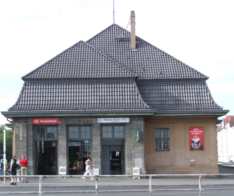 Das südliche Empfangsgebäudes des S-Bahnhofes Messe Nord/ICC (ehemals witzleben) an der Ostpreußenbrücke in Berlin-Charlottenburg Fotograf: harald rossa Datum: Juni 2006